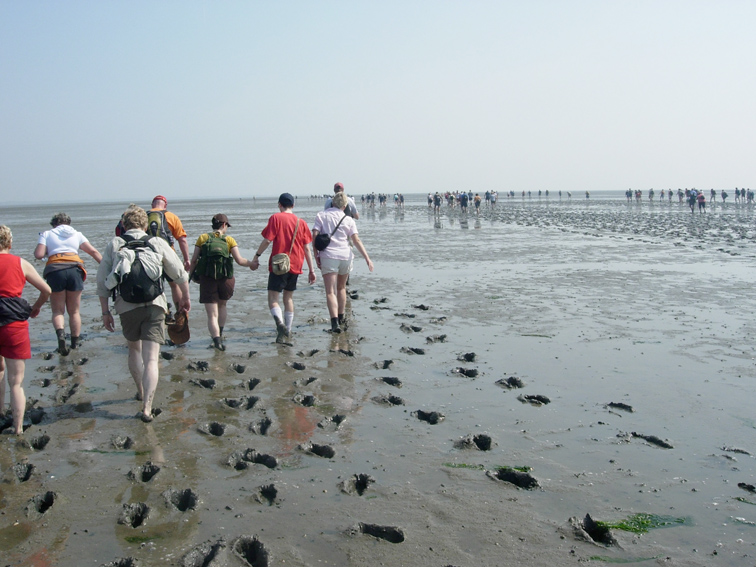 mudflat hiking in East Frisia (Ostfriesland), Germany; Wattwandern in Ostfriesland